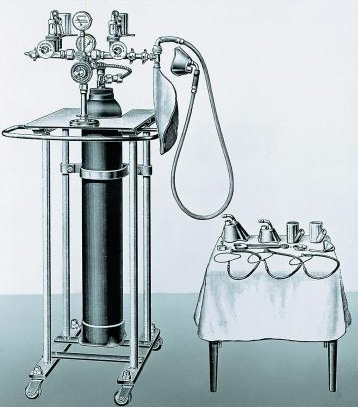 Наркозный аппарат Roth-Dräger